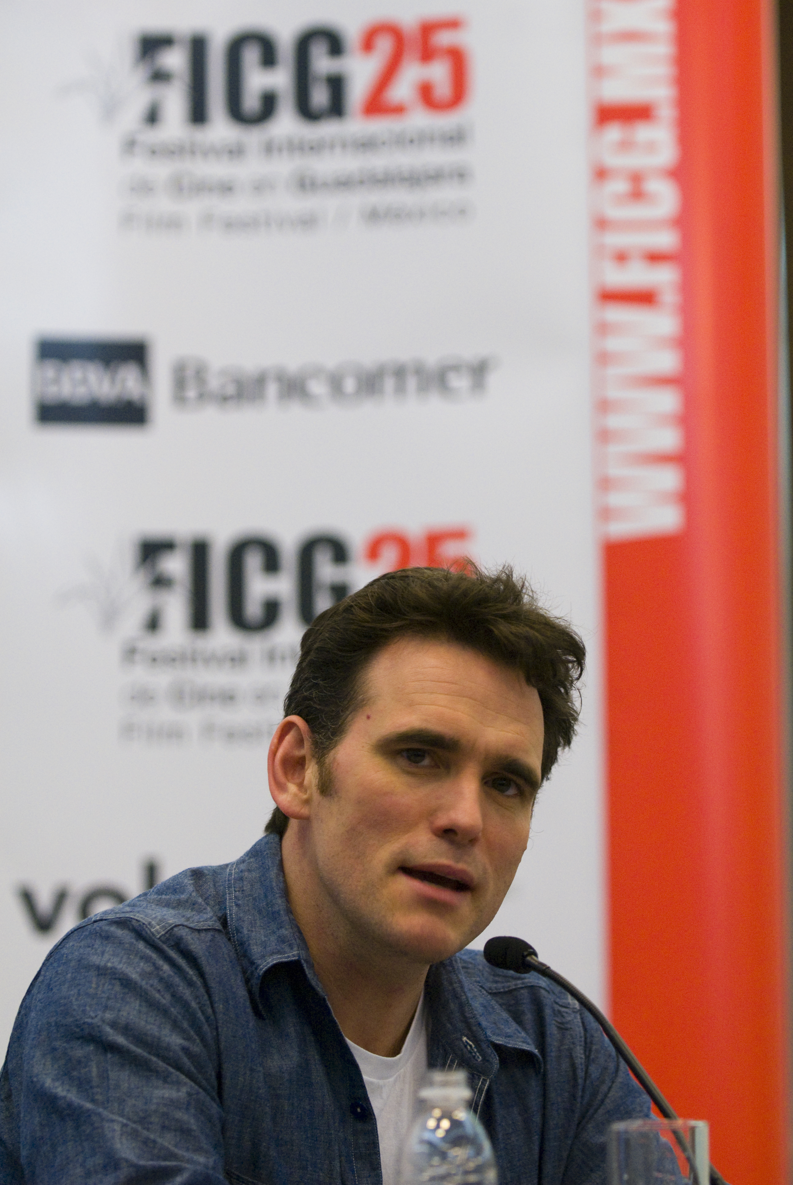 Conferencia de prensa de Matt Dillon, Premio Guadalajara Internacional, en el marco del Festival Internacional de Cine de Guadalajara en su edición 25. 12 de Marzo, 2010. Guadalajara, México. © Cortesía FICG25 / Michel Amado Carpio.